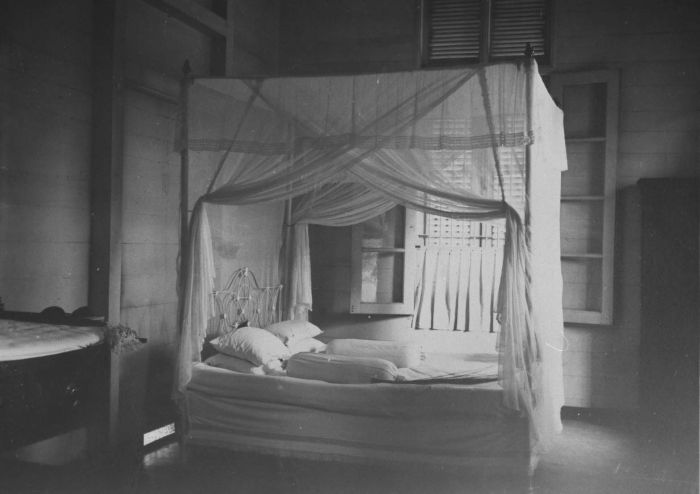 Foto. Een bed met klamboe in de slaapkamer van het huis van houtvester C.H. Japing in Olehleh